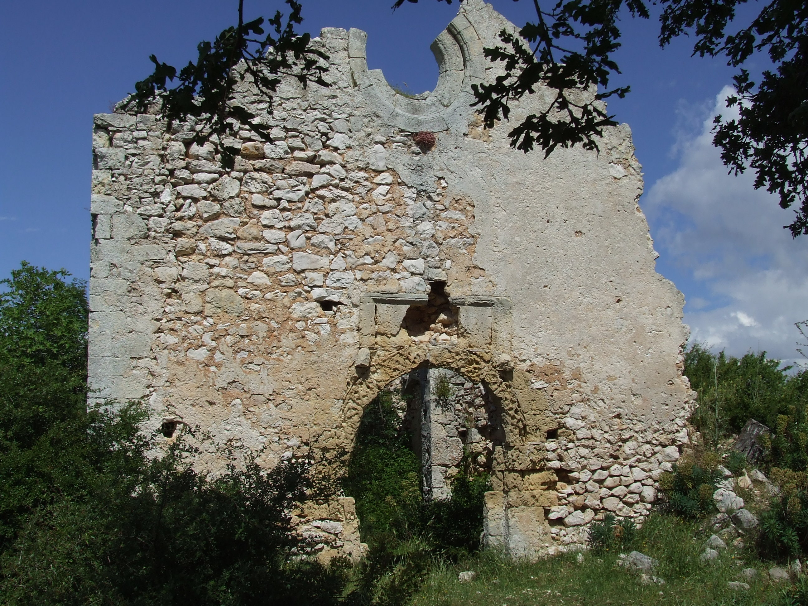 Chiesa di Sant'Egidio (vista frontale) - S.Giovanni Rotondo (FG)